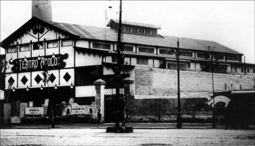 Edifici del Teatre Apol·lo de Barcelona, al Paral·lel, cap al 1910. Els cartells anuncien que s'hi representa Bohemios, la sarsuela d'Amadeu Vives.